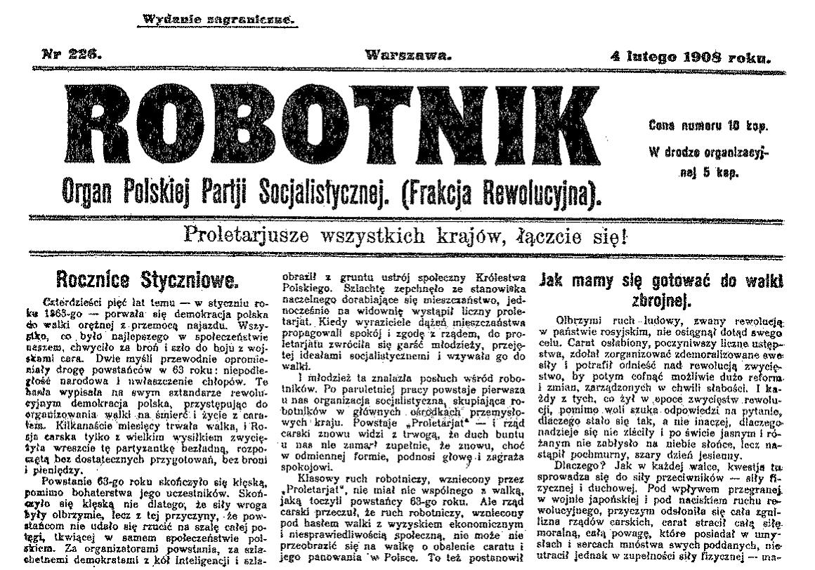 Strona "Robotnika"" PPS-Frakcji Rewolucyjnej z 1908 r.